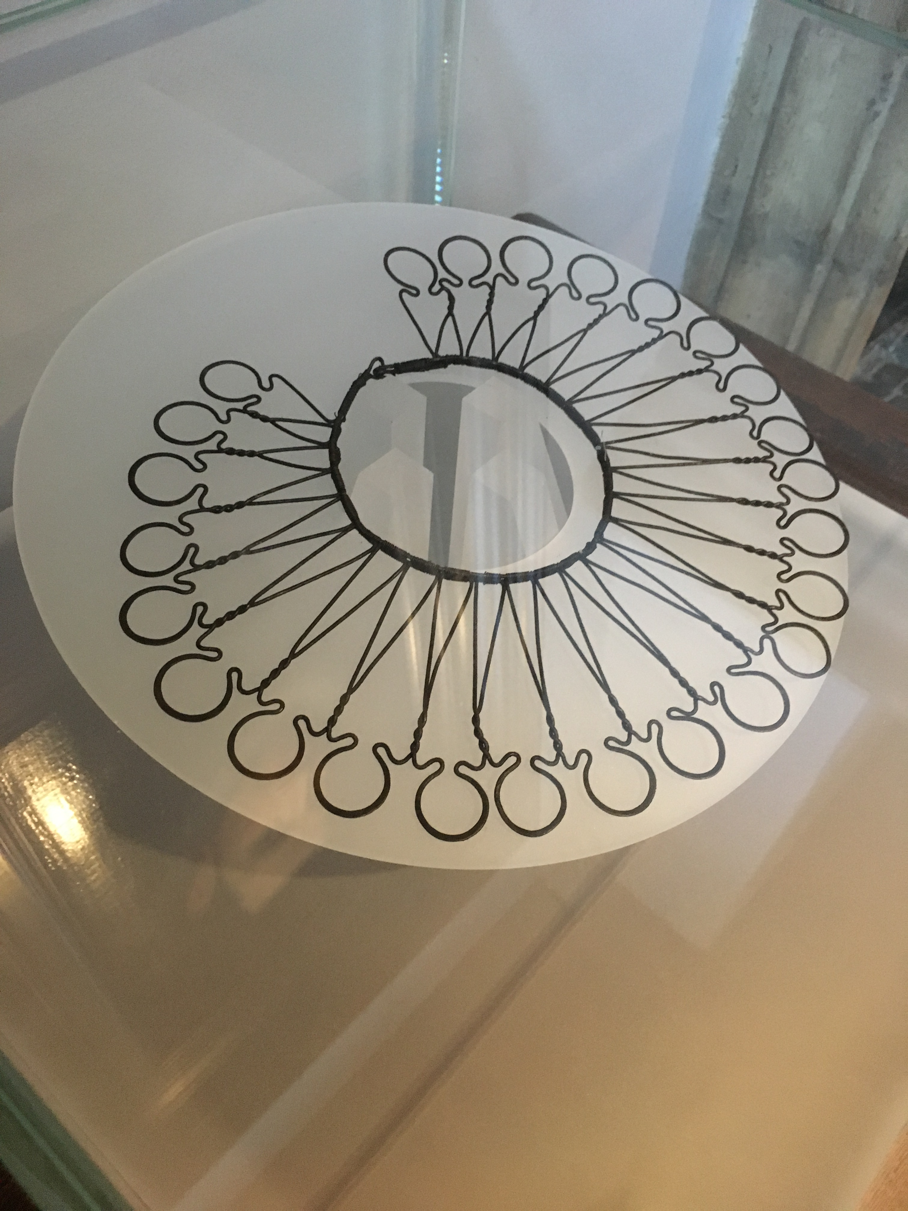 Casa Rubens - Struttura metallica per gorgiera